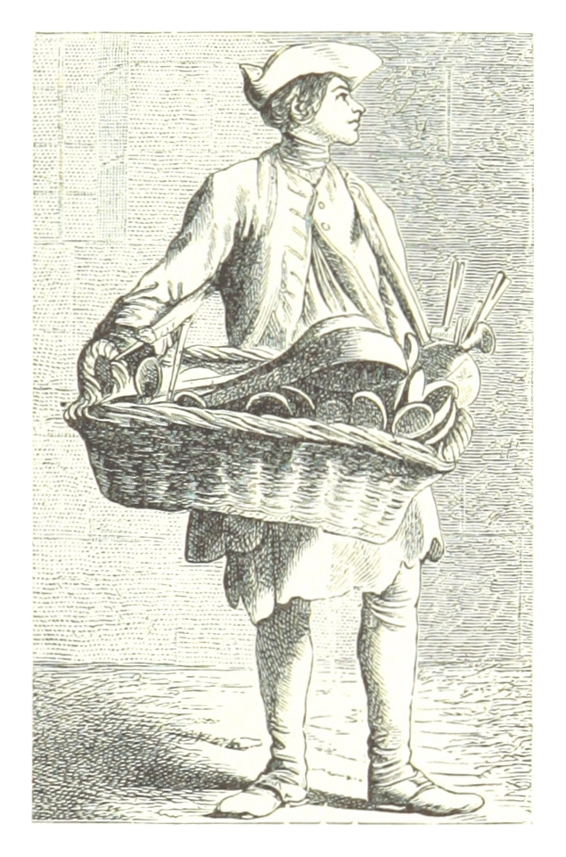 Vente ambulante. Vendeur de rue ou colporteur portant un éventaire en osier avec des ustensiles ménagères.